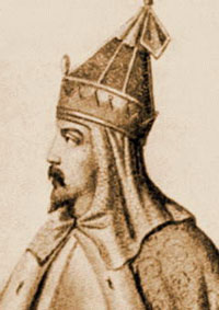 Iwan II Piękny- książę moskiewski w latach 1353-1359